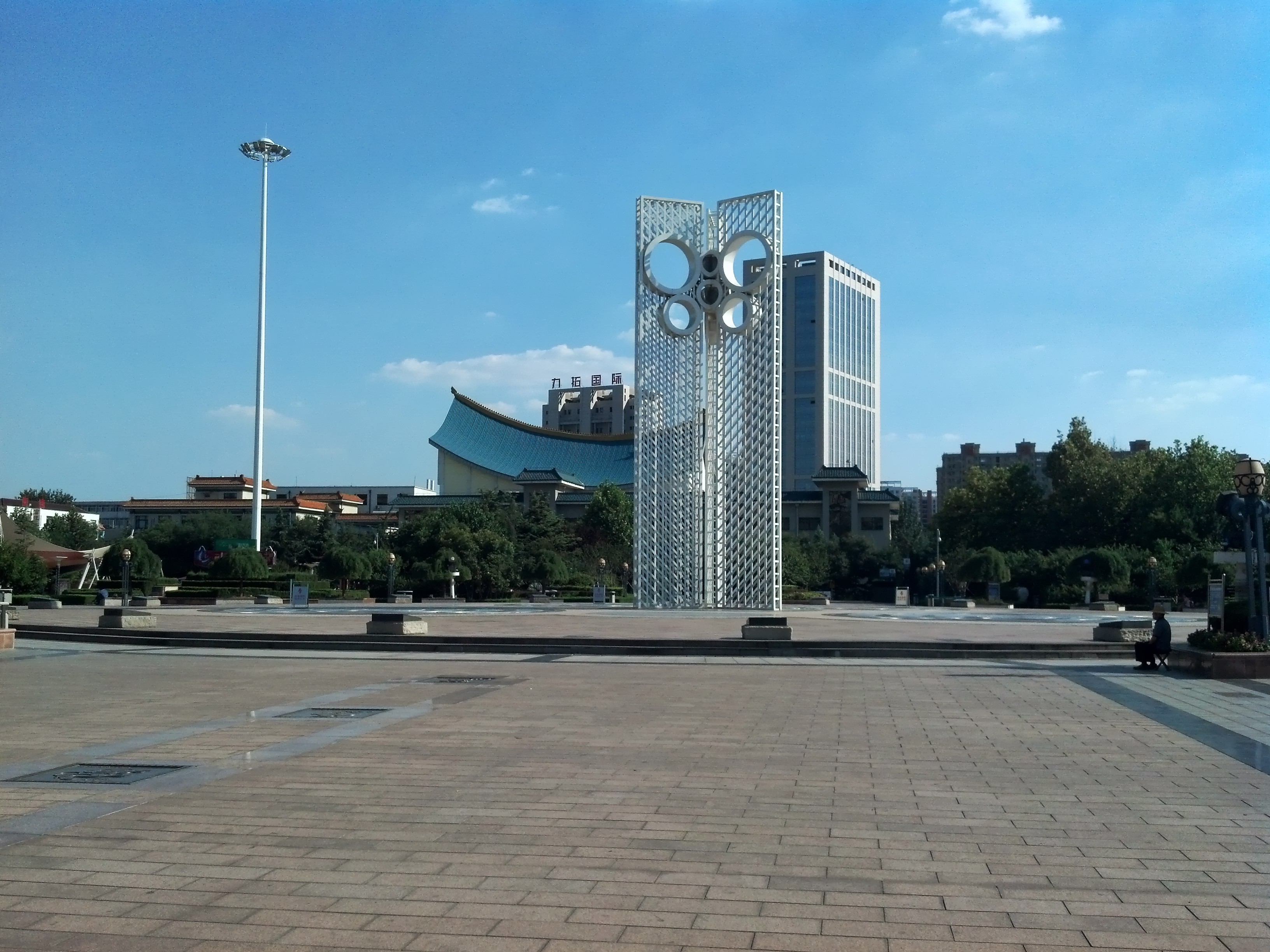 Weicheng, Weifang, Shandong, China